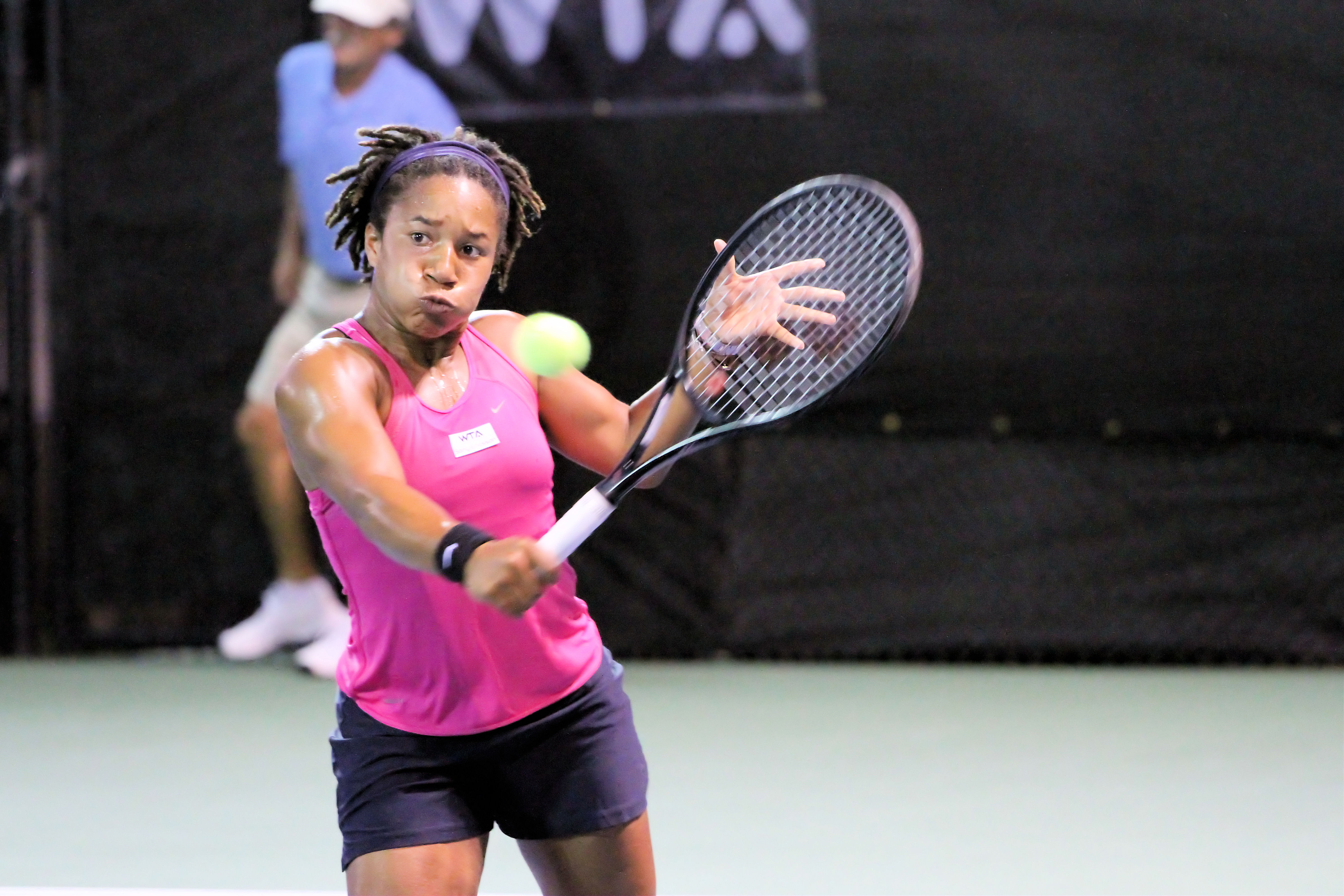 Megan Moulton-Levy (USA) 2011-08-24 Dekmeijere / Moulton-Levy vs Arvidsson / Dellacqua